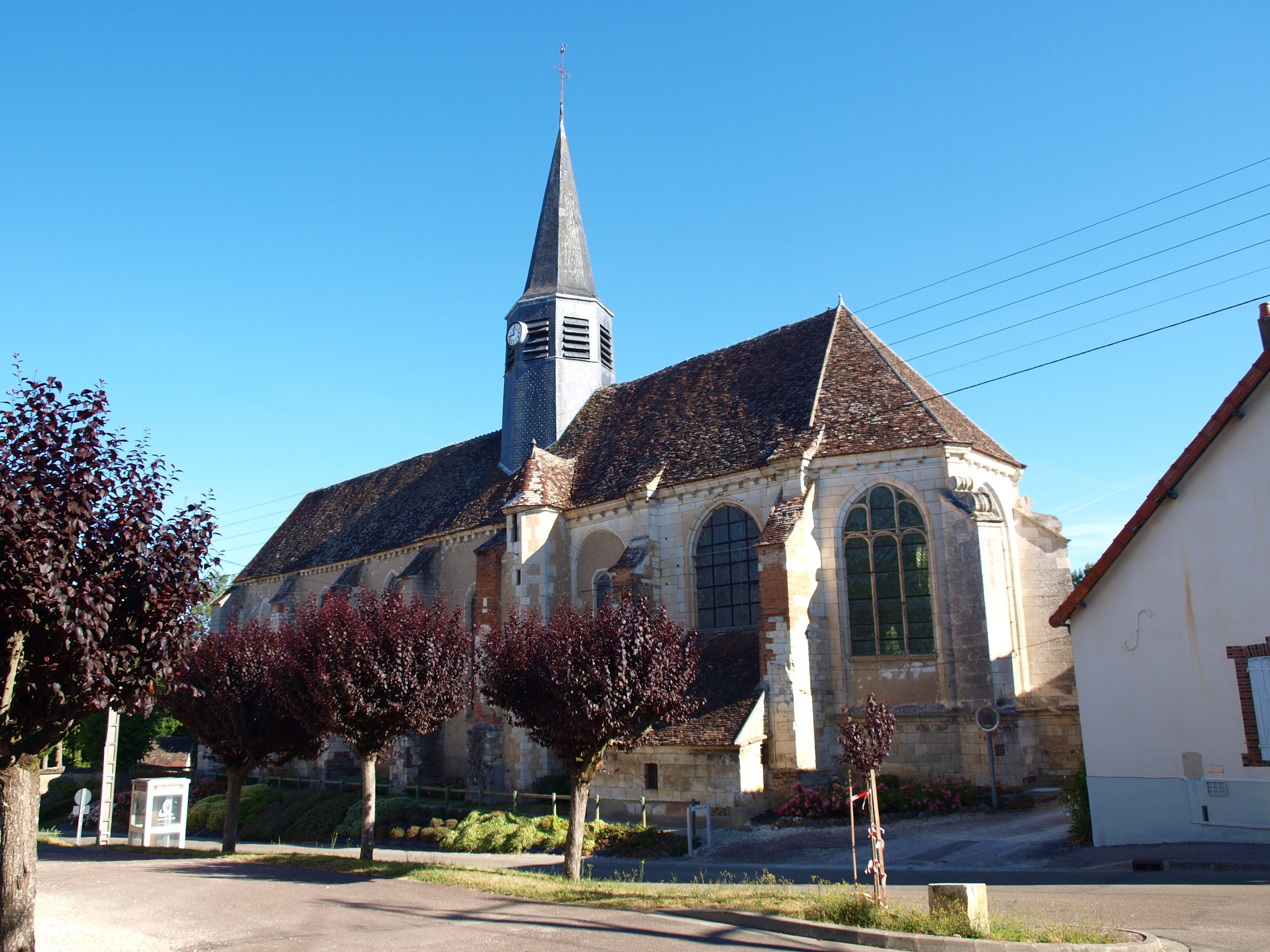 Guerchy (Yonne, France)